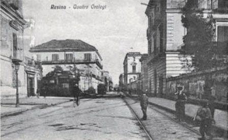 Resina (oggi Ercolano) - Via Quattro Orologi